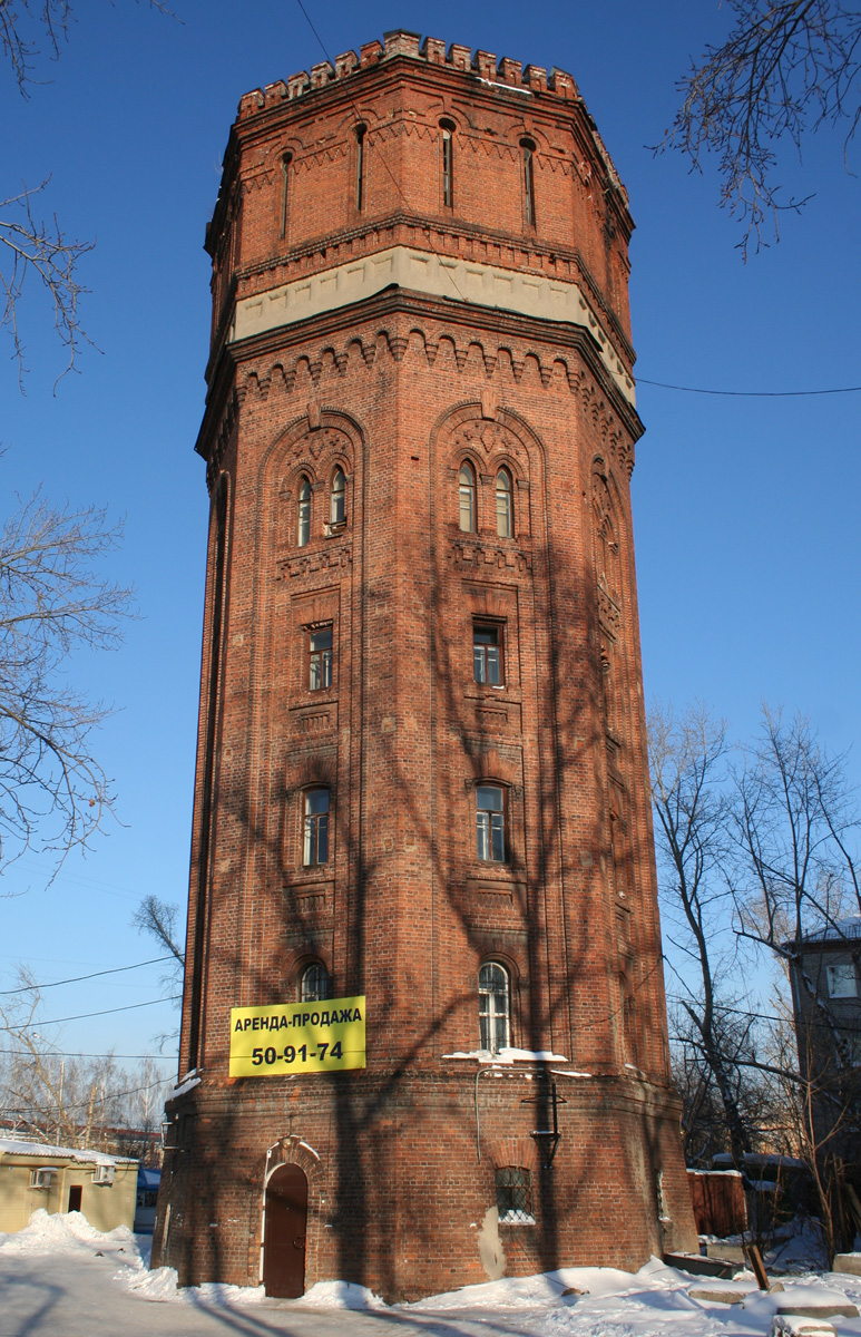 Бывшая водонапорная башня на перекрёстке ул. Яковлева и ул. Пушкина (ул. Пушкина, 23, Томск)